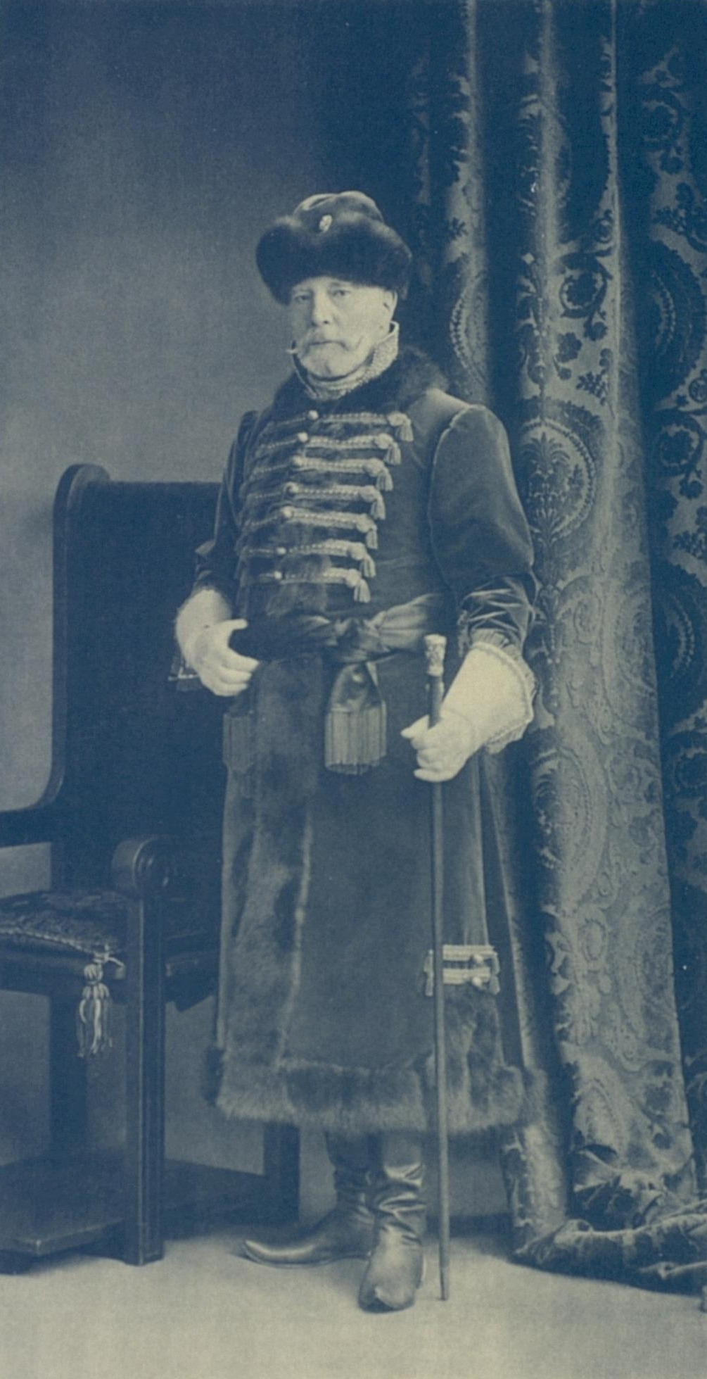 Граф Анатолий Владимирович Орлов-Давыдов в костюме Русского Боярина XVII века. Обер-шталмейстер.